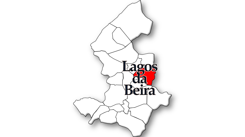 População